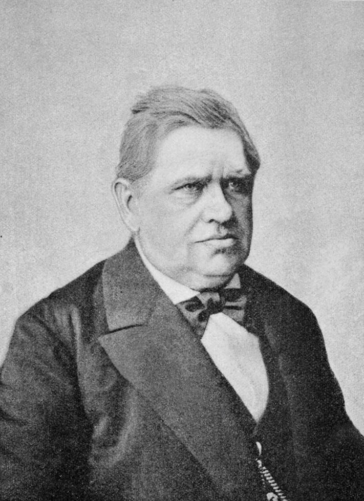 Vojtěch Brechler (1826-1891), český malíř – krajinář a ilustrátor